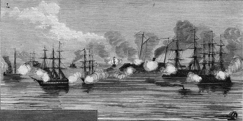 Иллюстрации к очерку о морских маневрах на Транзундском рейде в 1882 году. Бой 24-го августа. Гравюра из Всемирной иллюстрации